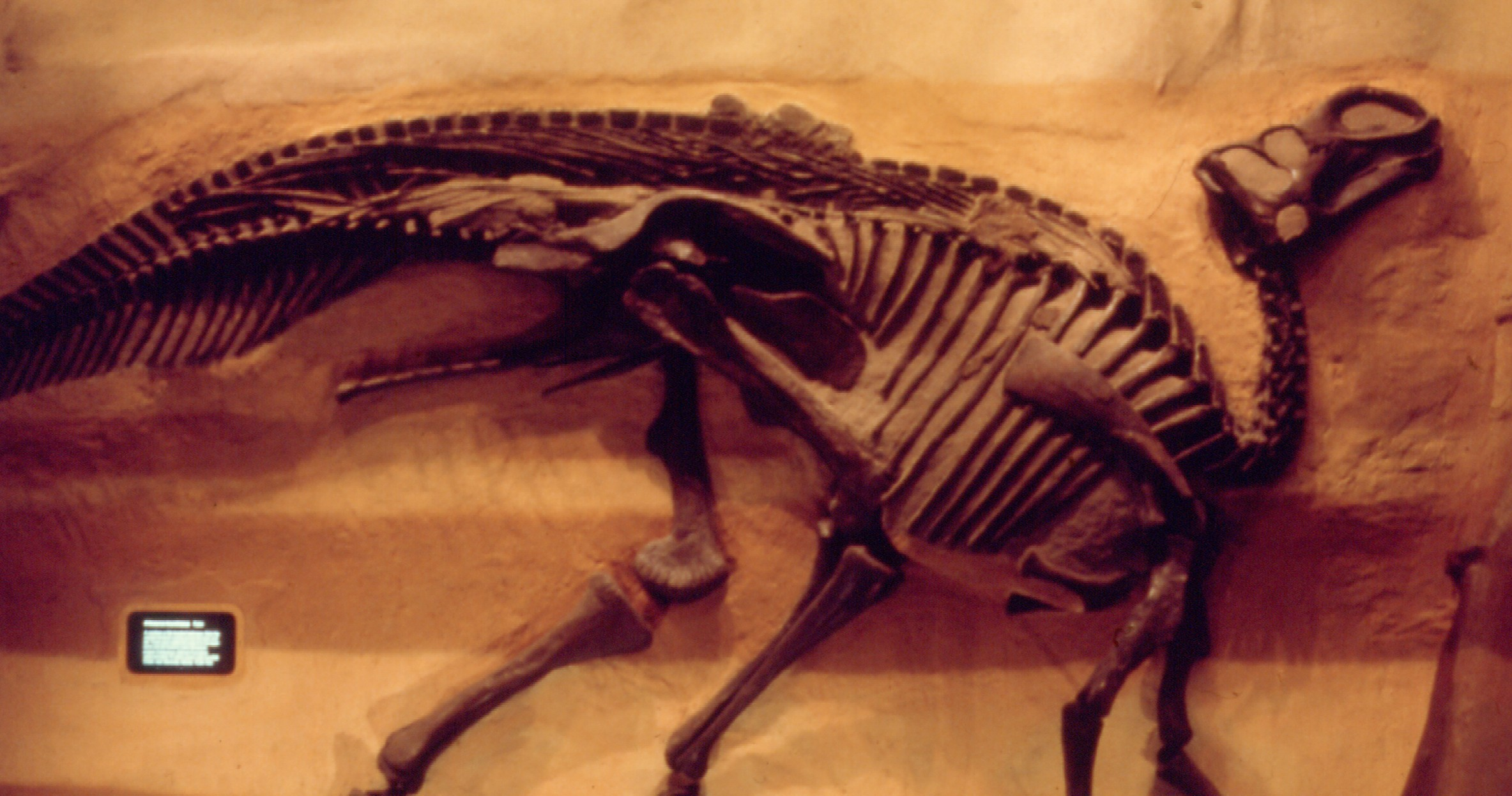 Royal Ontario Museum 30